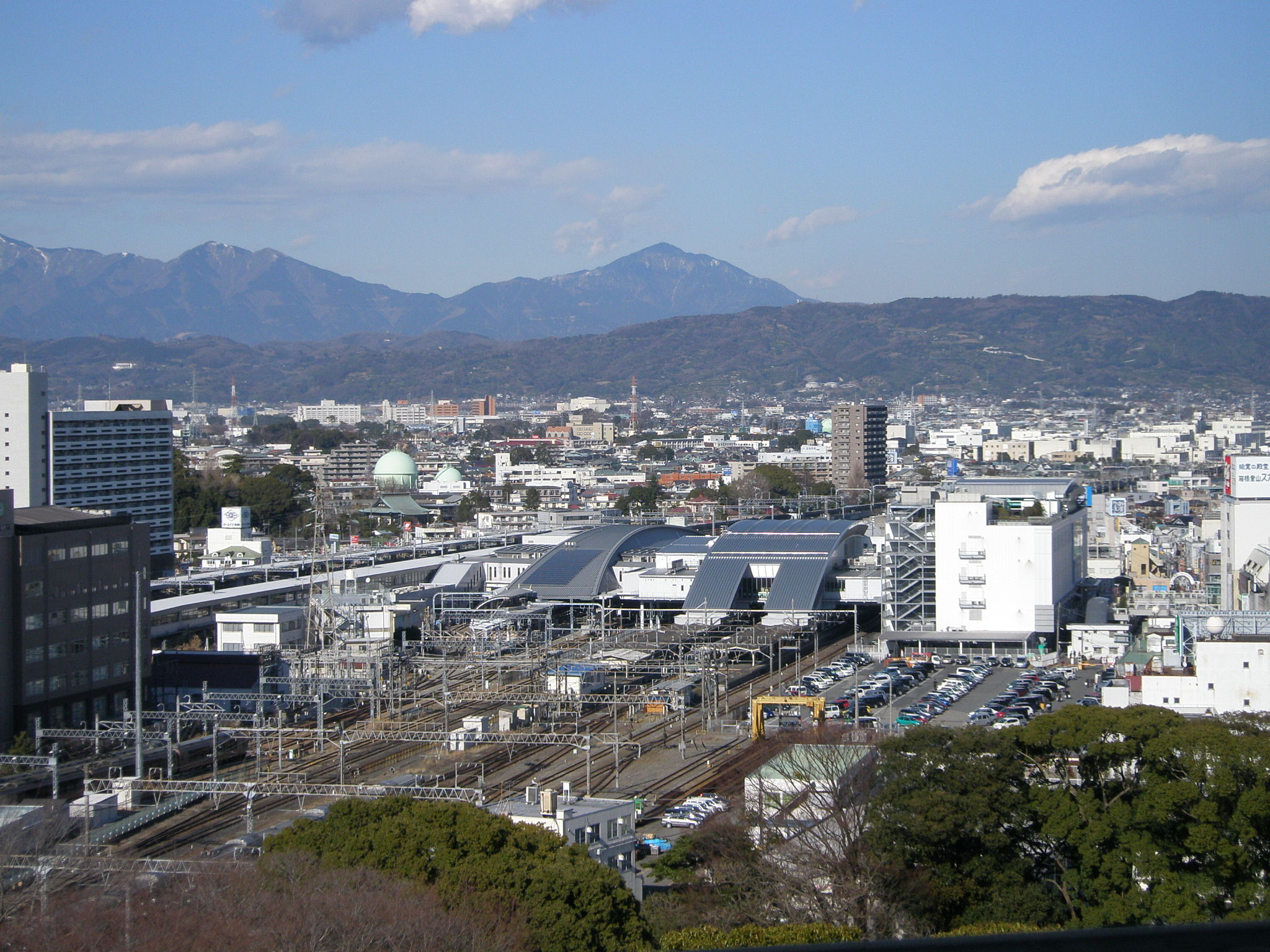 小田原城から見た小田原駅